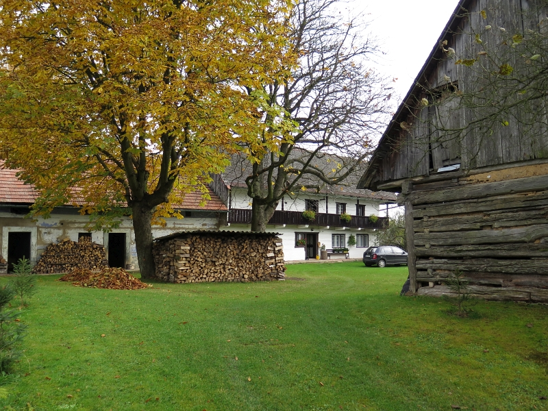 Usedlost čp. 20, Skuřina 20, Skuřina.